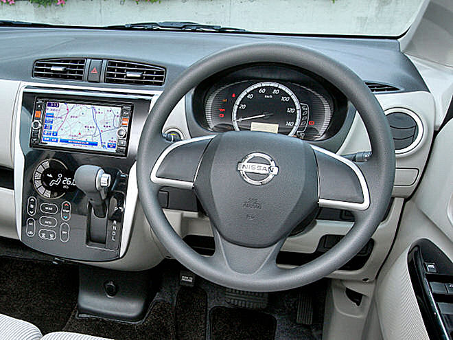 日産デイズ S インテリア